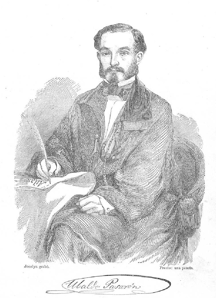 Ubaldo Pasarón y Lastra, retrato aparecido al frente del tomo I de sus Obras Completas, Nueva York, 1860. Biblioteca Nacional de España